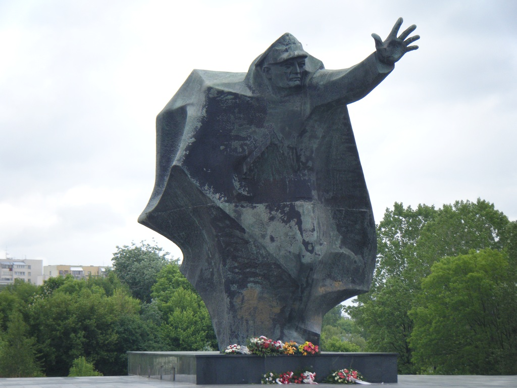 Pomnik Kościuszkowców w Warszawie.